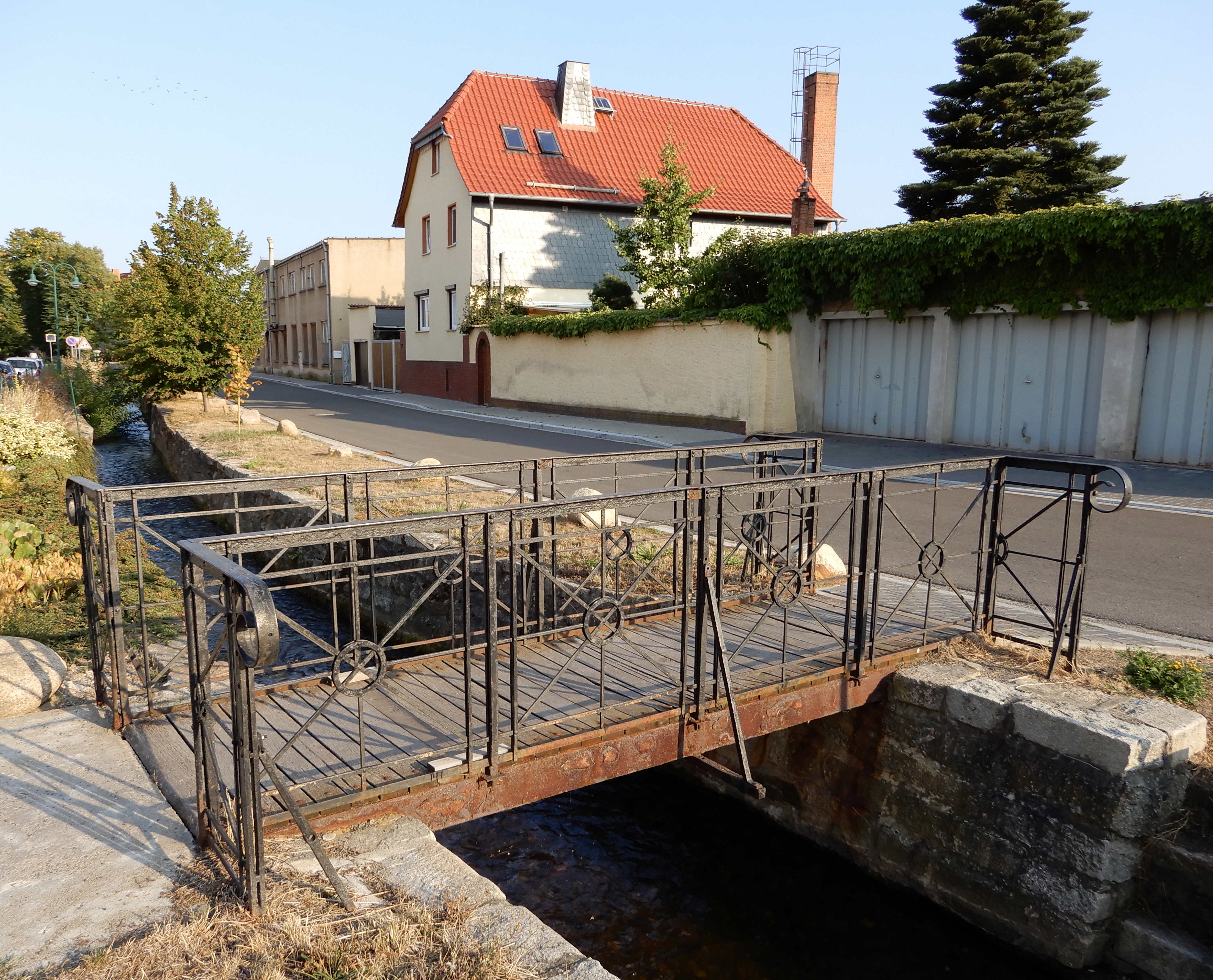 Brücke über den Silberbach in der Schleifenbachstraße, Thale